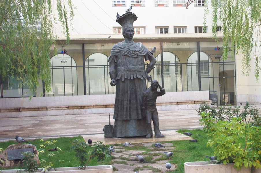 Monumento al Gigante Indio (Reus)